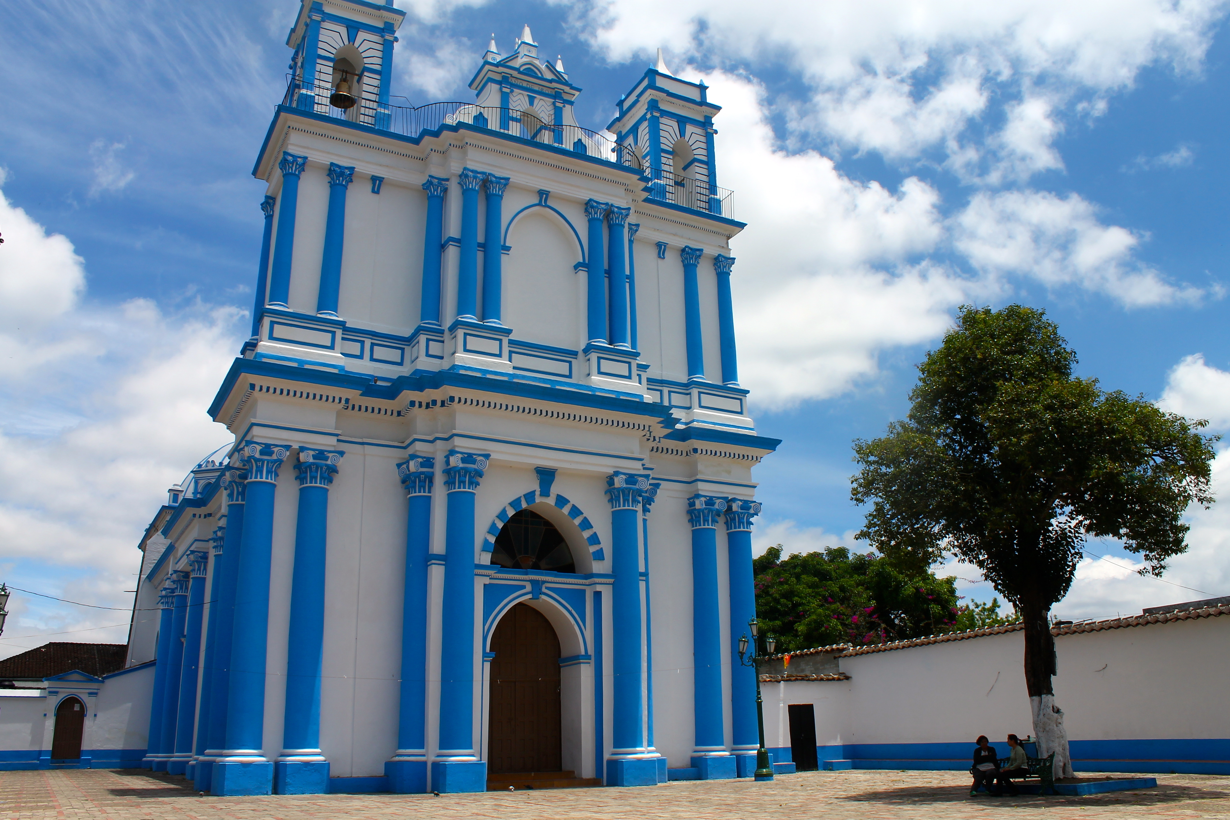 Folklore de la vida cotidiana de San Cristobal de las Casas, Chiapas.